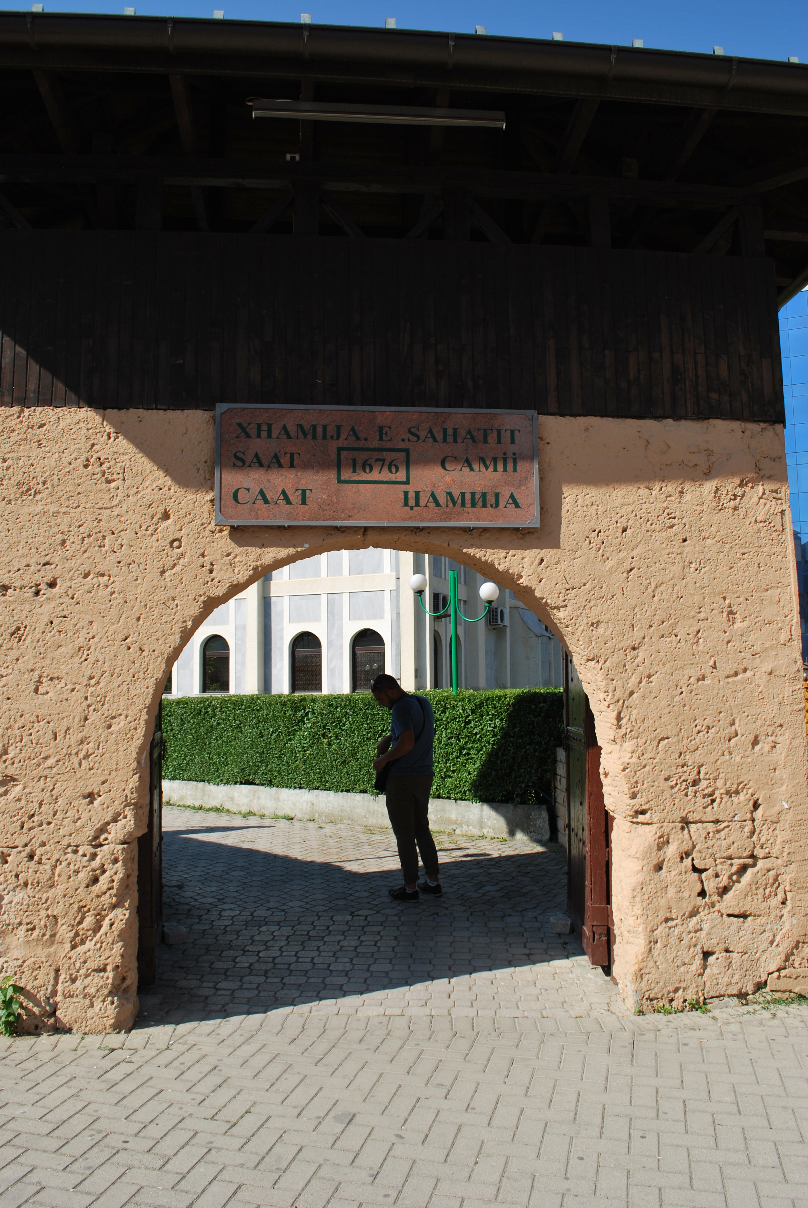 Saat Džamija in Gostivar, Macedonia